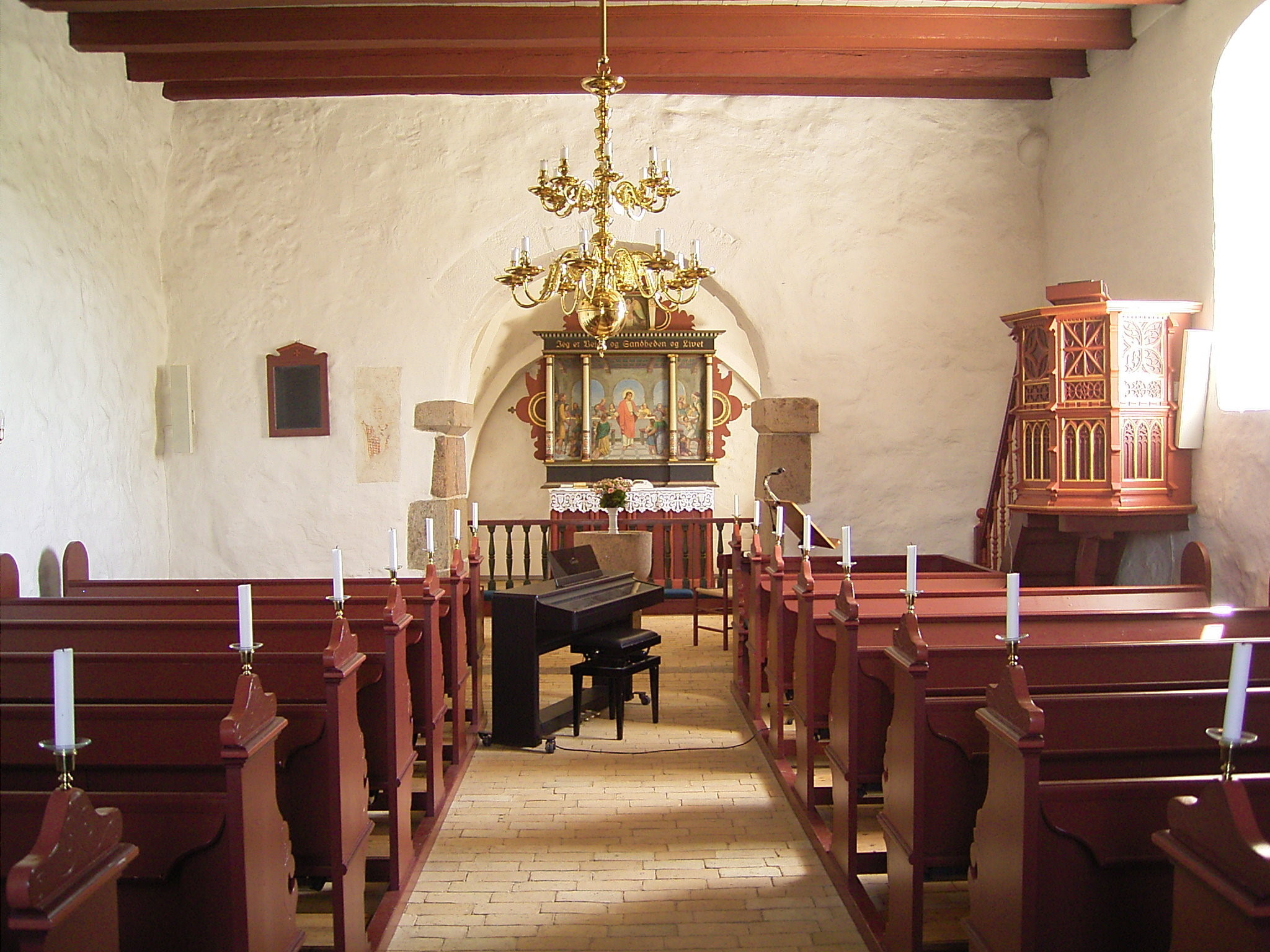 Volsted Kirke, Volsted Bygade 31, Volsted 9530 Støvring